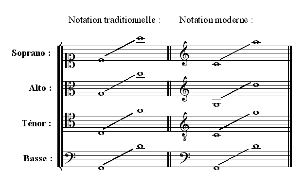 Voix et clés - Licence GFDL